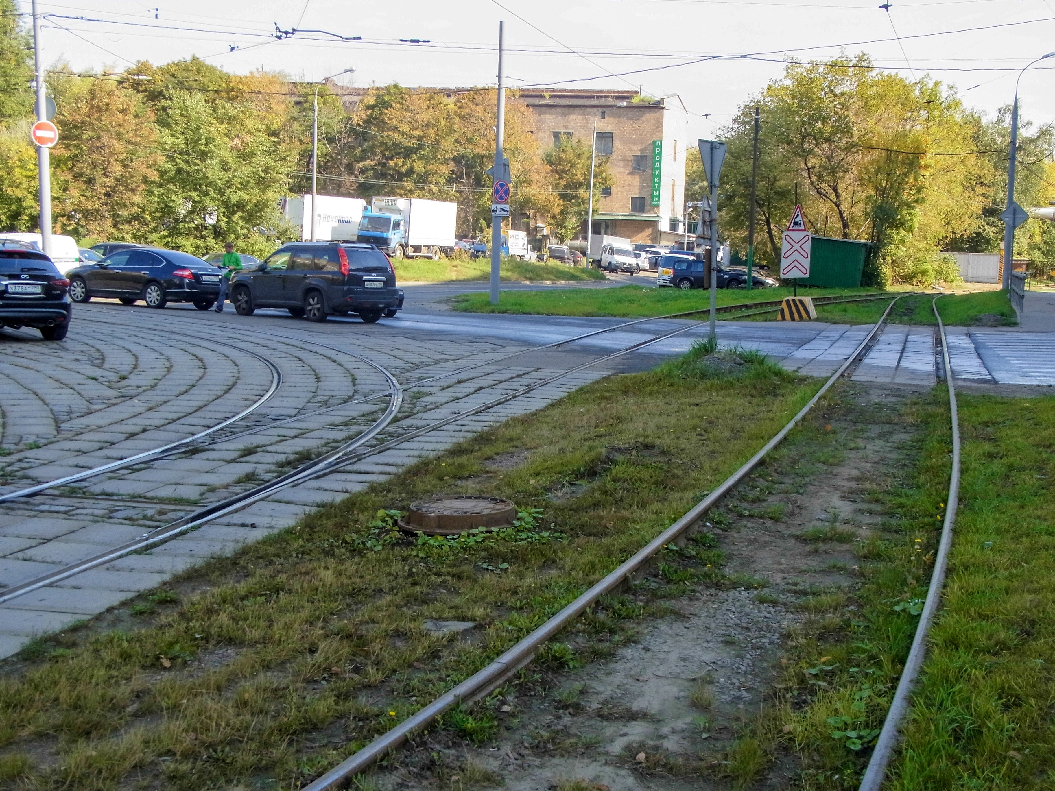 Трамвайно-железнодорожный гейт перед базой ГУП Мосгортранс (ветка станции Угрешская)